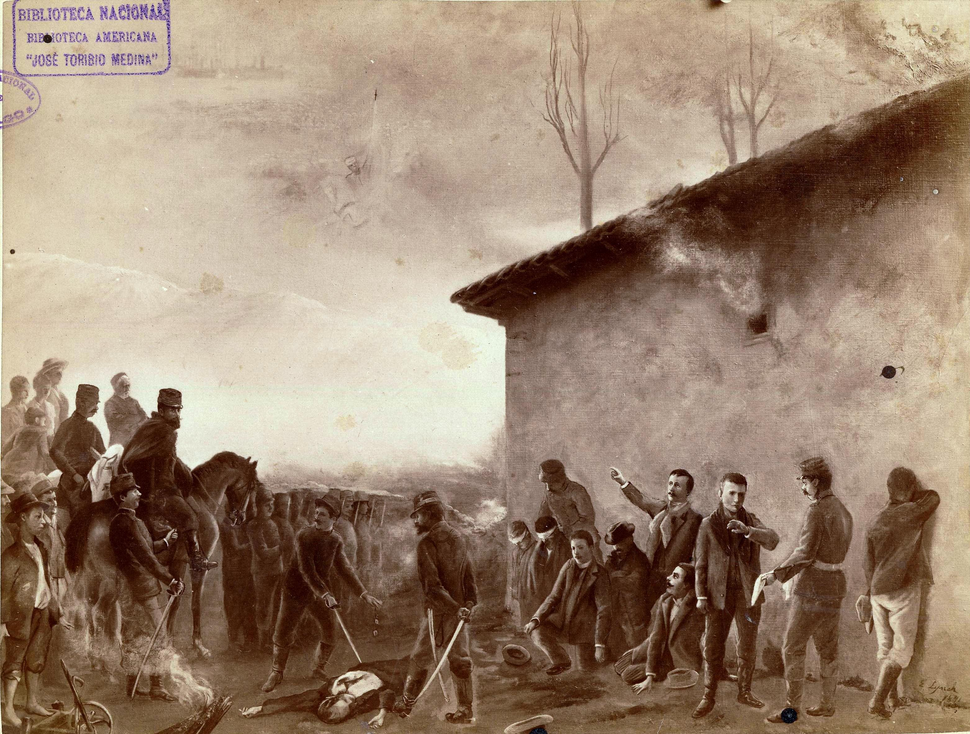 Matanza de Lo Cañas: En el marco de la Guerra Civil de 1891, fuerzas de gobierno dan muerte a jóvenes aristocráticos y artesanos opositores a Balmaceda, reunidos en el fundo de Lo Cañas, del líder conservador, Carlos Walker Martínez, en la actual Comuna de La Florida, la llamada "Matanza de lo Cañas".